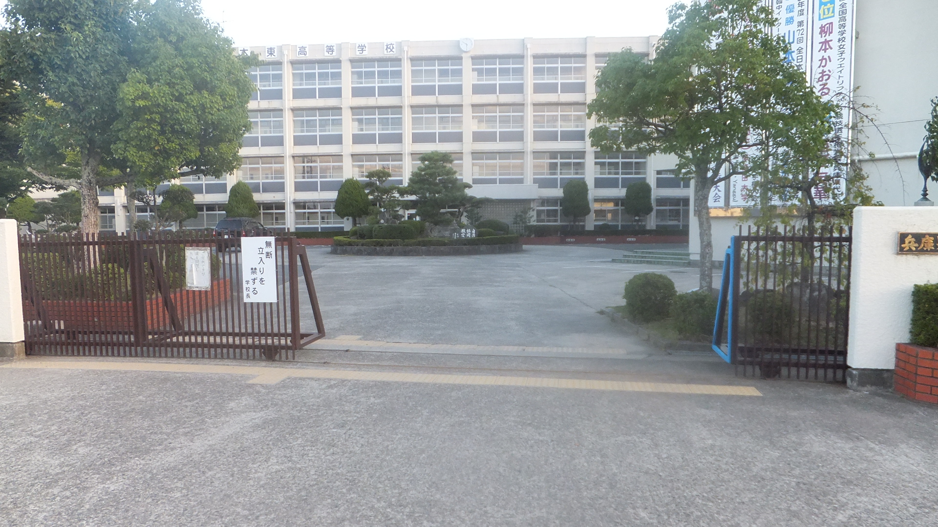 兵庫県立三木東高等学校 2012年